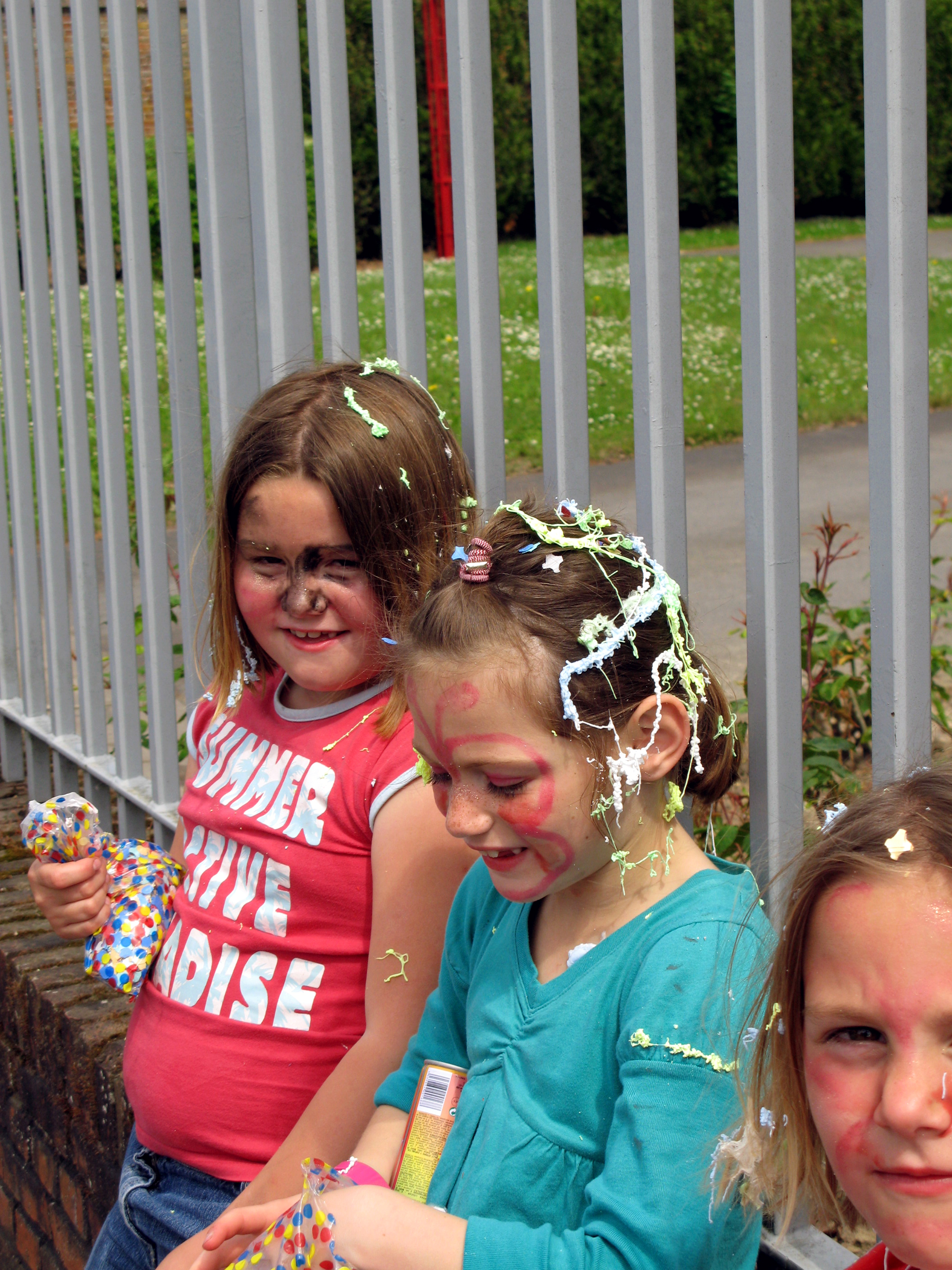 Guesnain (Nord, France) - Animation festive au centre-ville, un dimanche de printemps. Dans la rue Francisco Ferrer (à proximité immédiate de la Mairie, derrière l'ancienne brasserie), filles (assez "espiègles" et insistant pour se faire photographier) ayant déjà pas mal utilisé leurs bombes à fil serpentin, bien avant le départ de la parade des géants. .